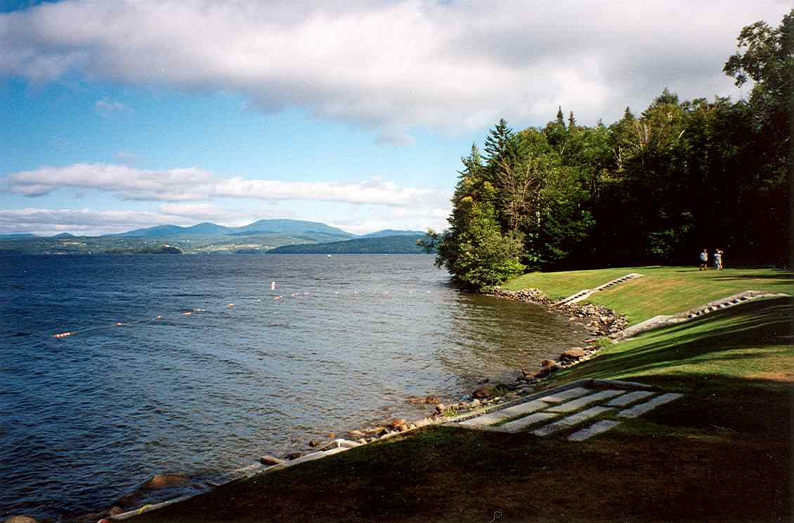 Rangeley Lake State Park, Maine